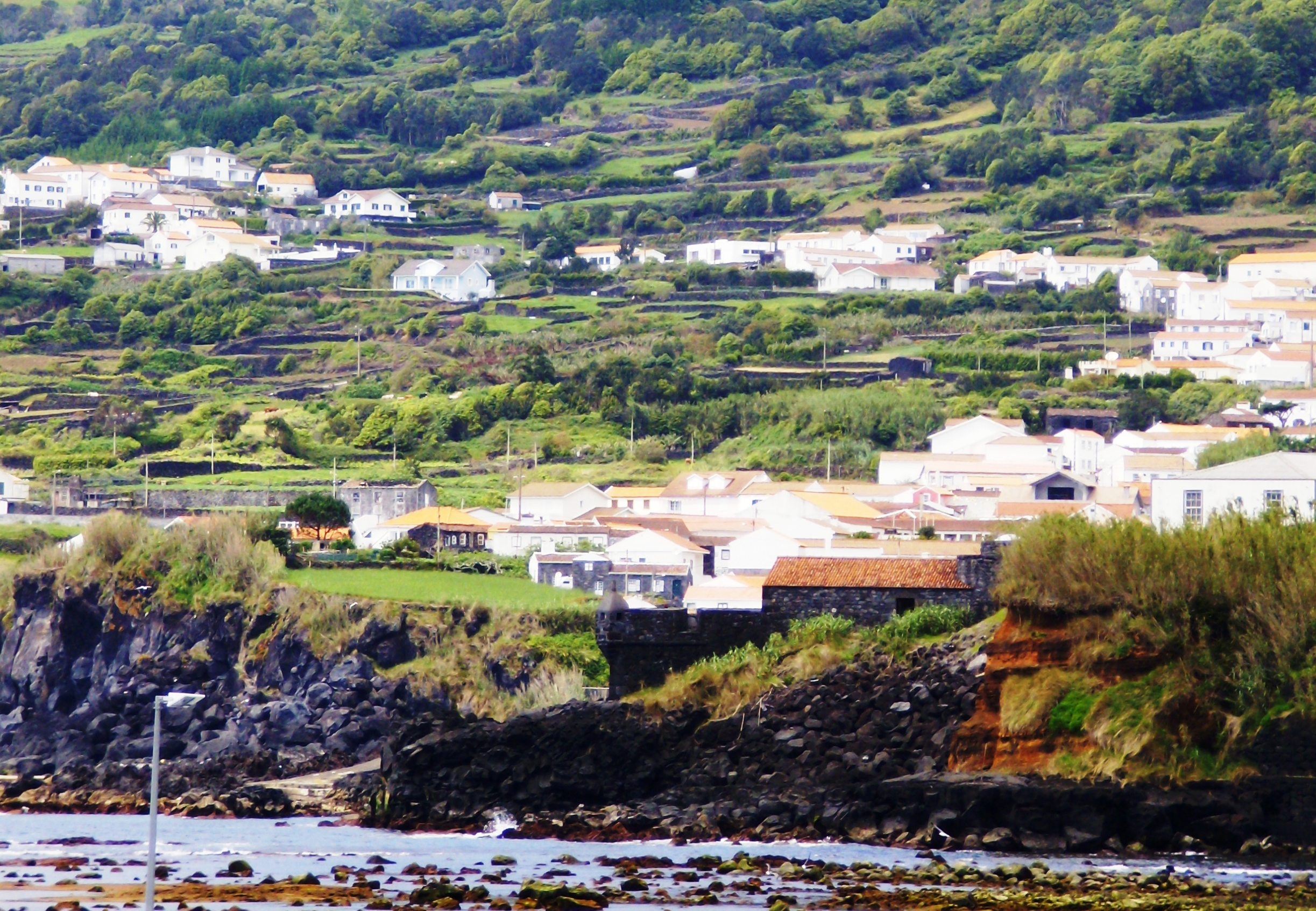 Forte de Santa Catarina, Lajes do Pico, ilha do Pico, Açores.